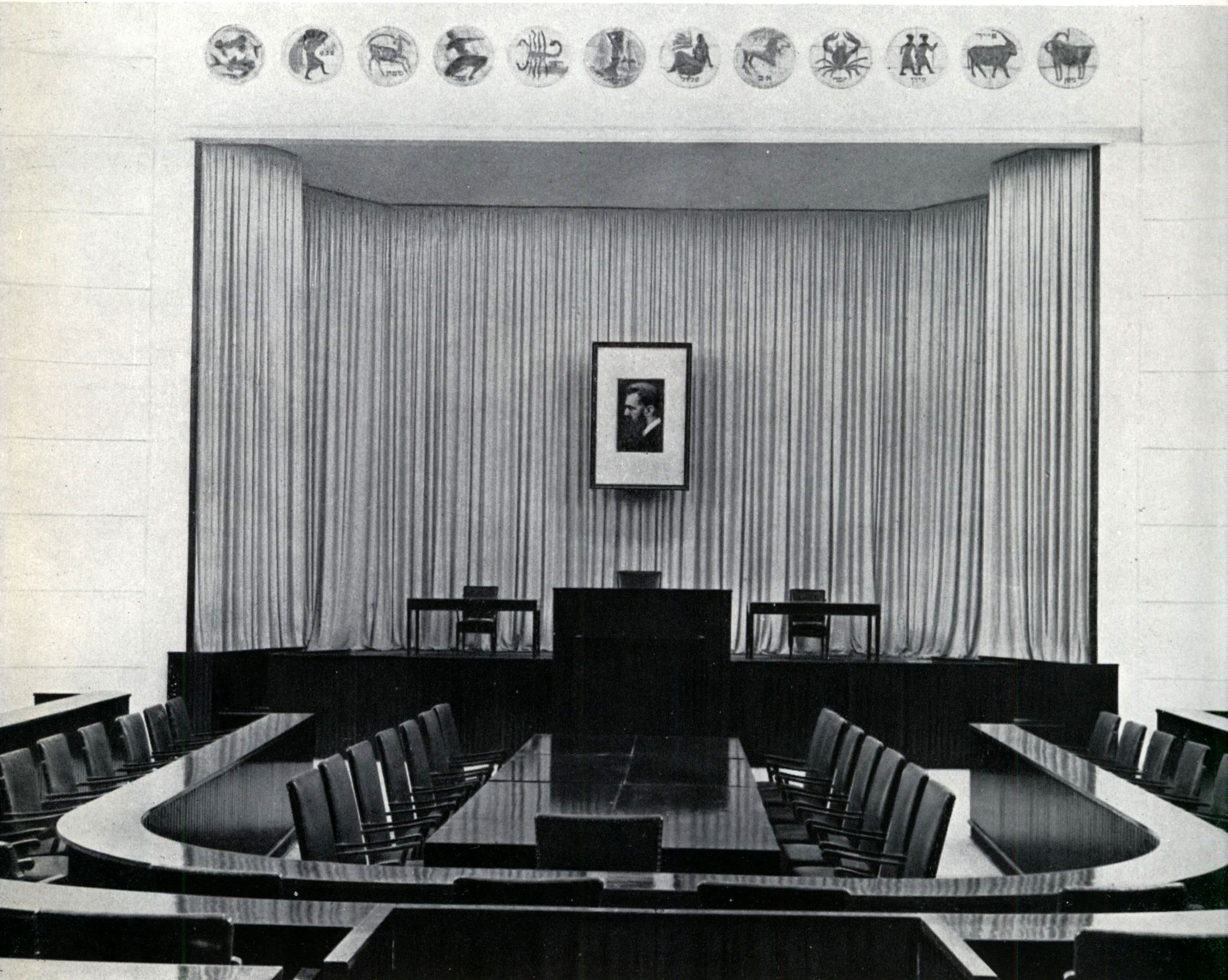 מושבה הזמני של הכנסת הראשונה בבנייני קולנוע "קסם" ומלון "סן-רמו" על שפת ימה של תל-אביב, 1949 The 1st Knesset temporary venue in Tel Aviv